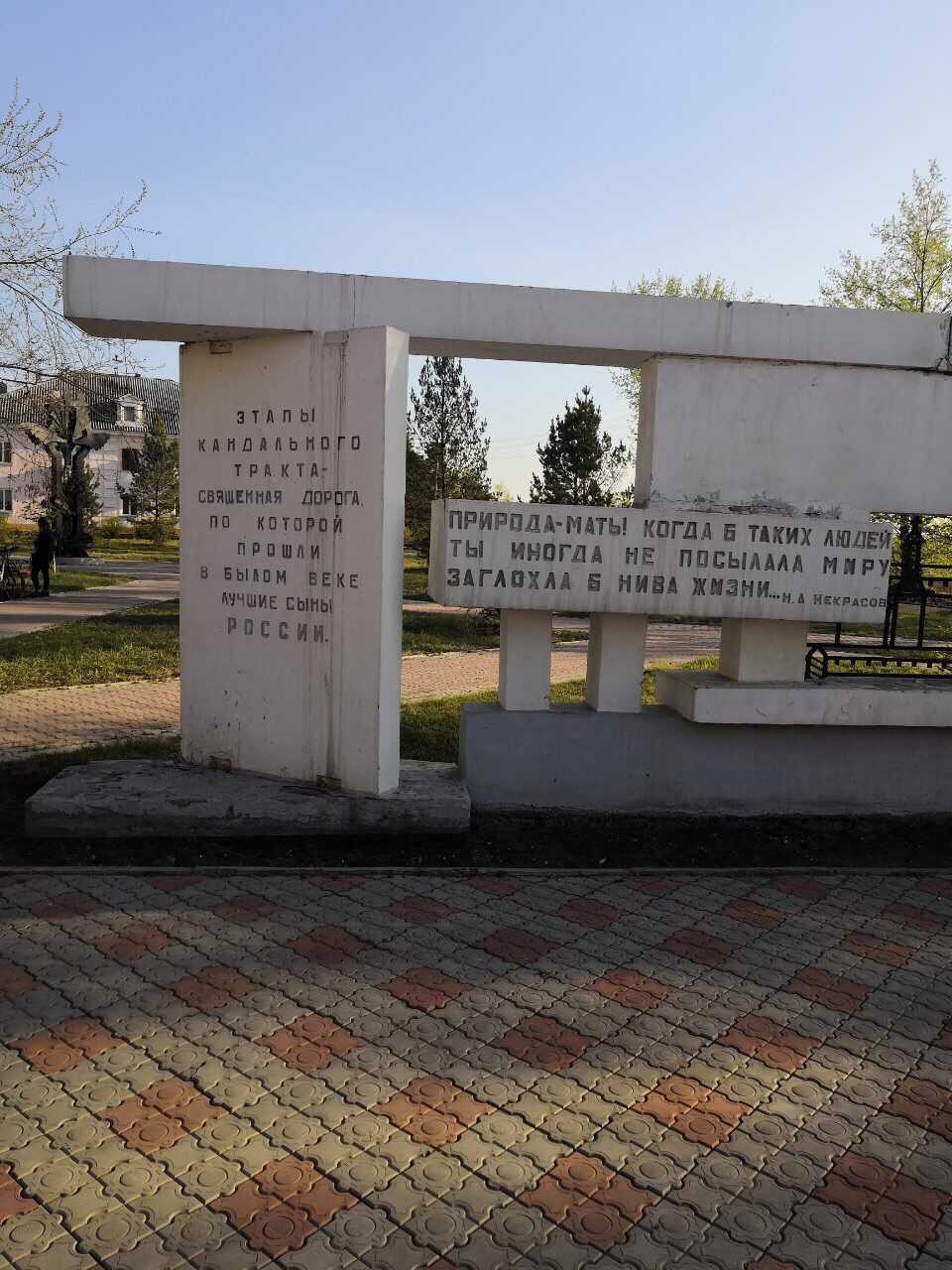 Цитаты Новокрещённых (слева) и Некрасова (справа).